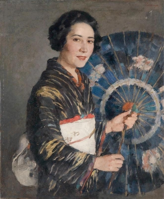 Frau Mikiko Meinl